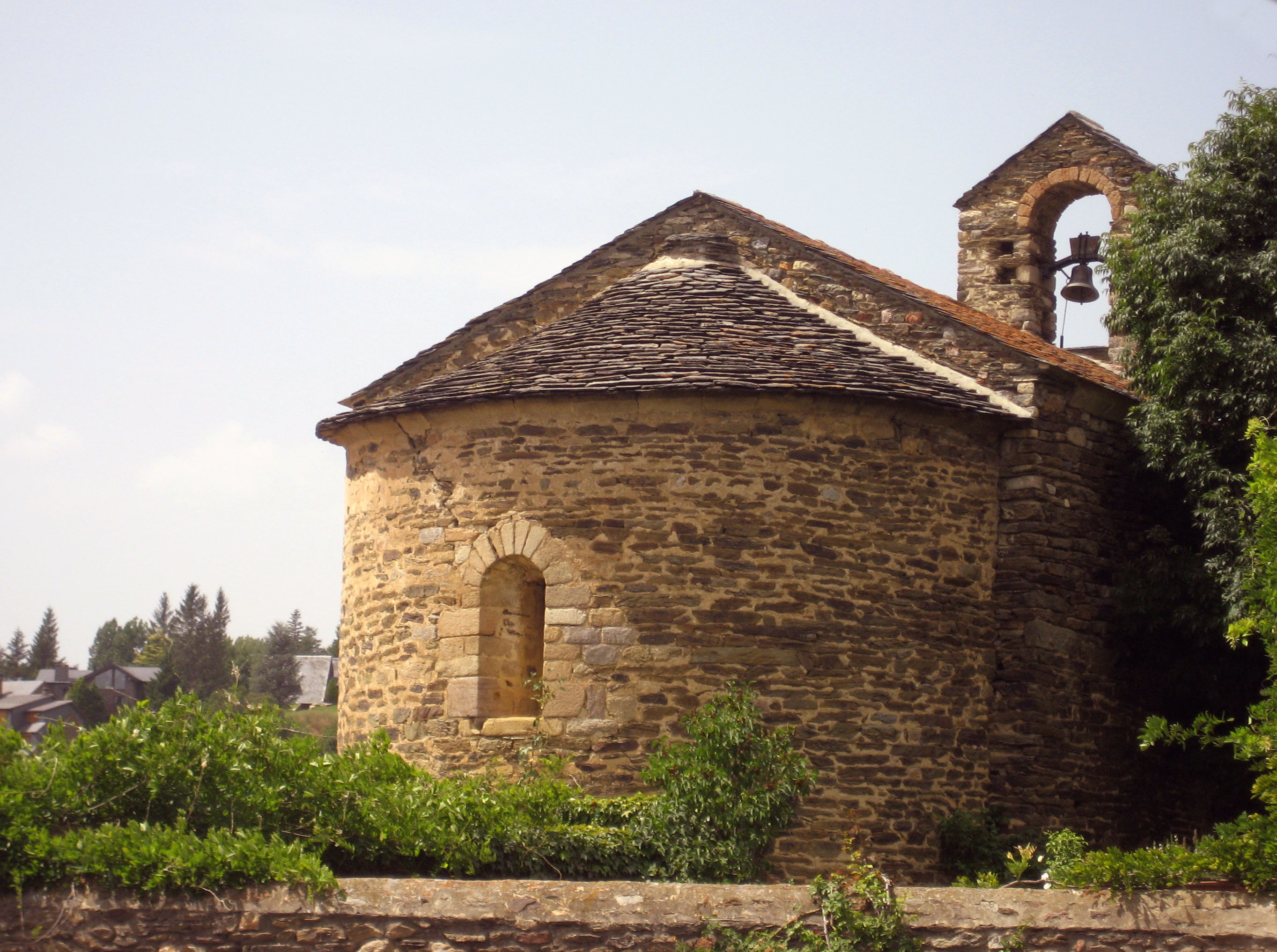 Iglesia de Santa Eugenia de Saga románica del siglo XI. Ger. Baja Cerdaña Cataluña.